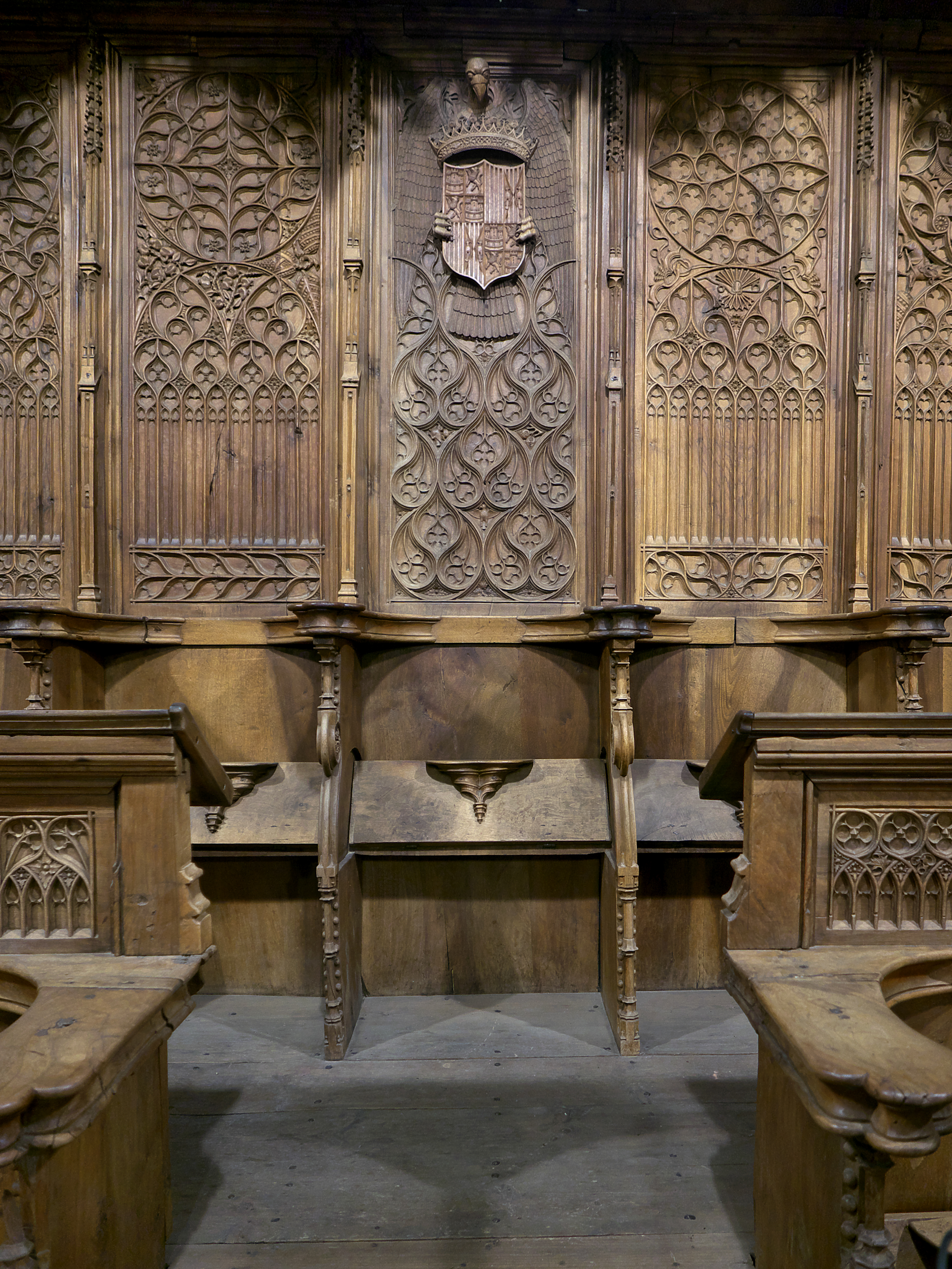 Los Reyes Católicos vuelven a contratar a Martín Sánchez después de su trabajo en el coro de la Cartuja de Miraflores Coro de los Padres, Cartuja de Santa María de Miraflores